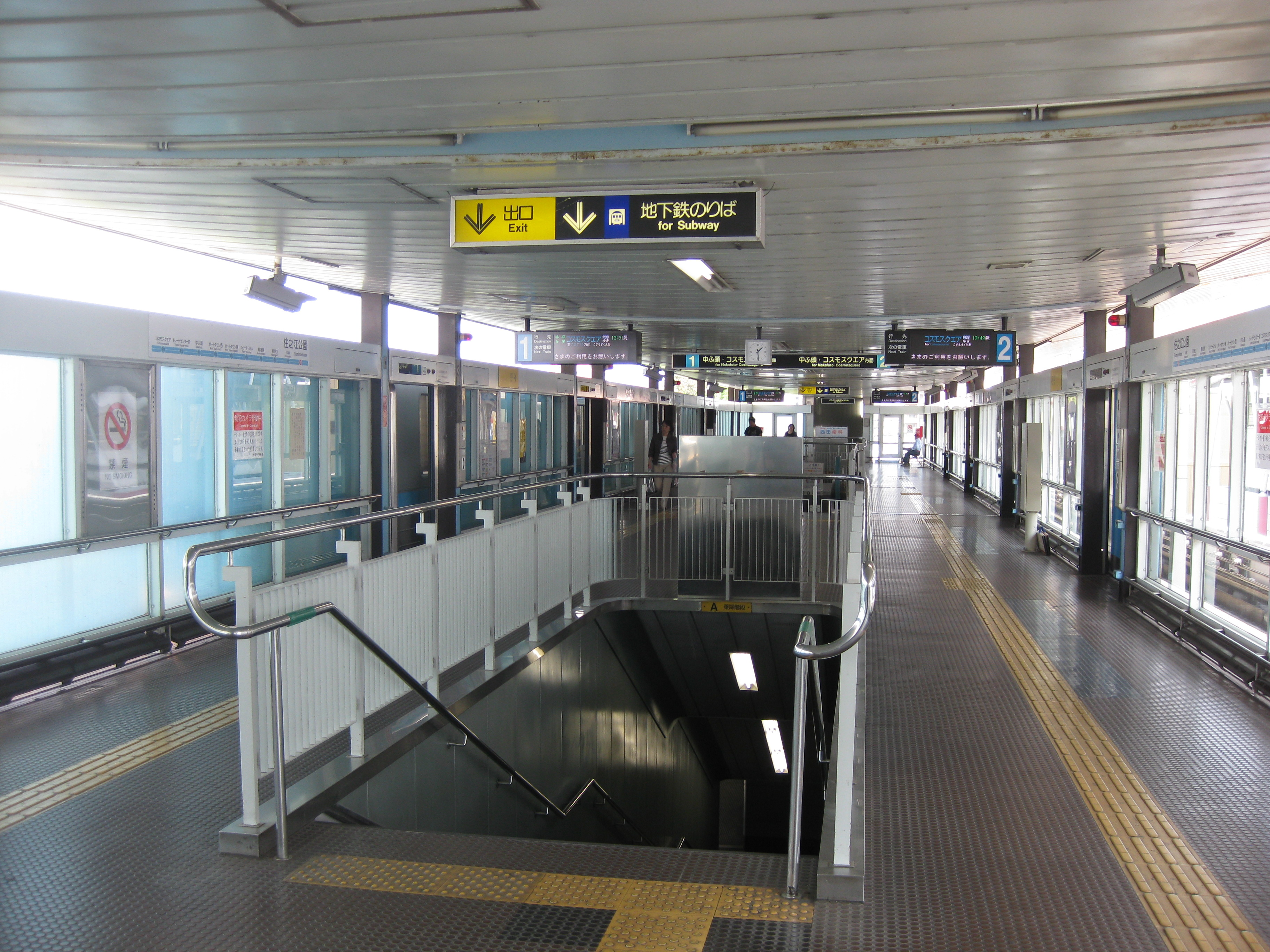 住之江公園駅ニュートラムプラットホーム